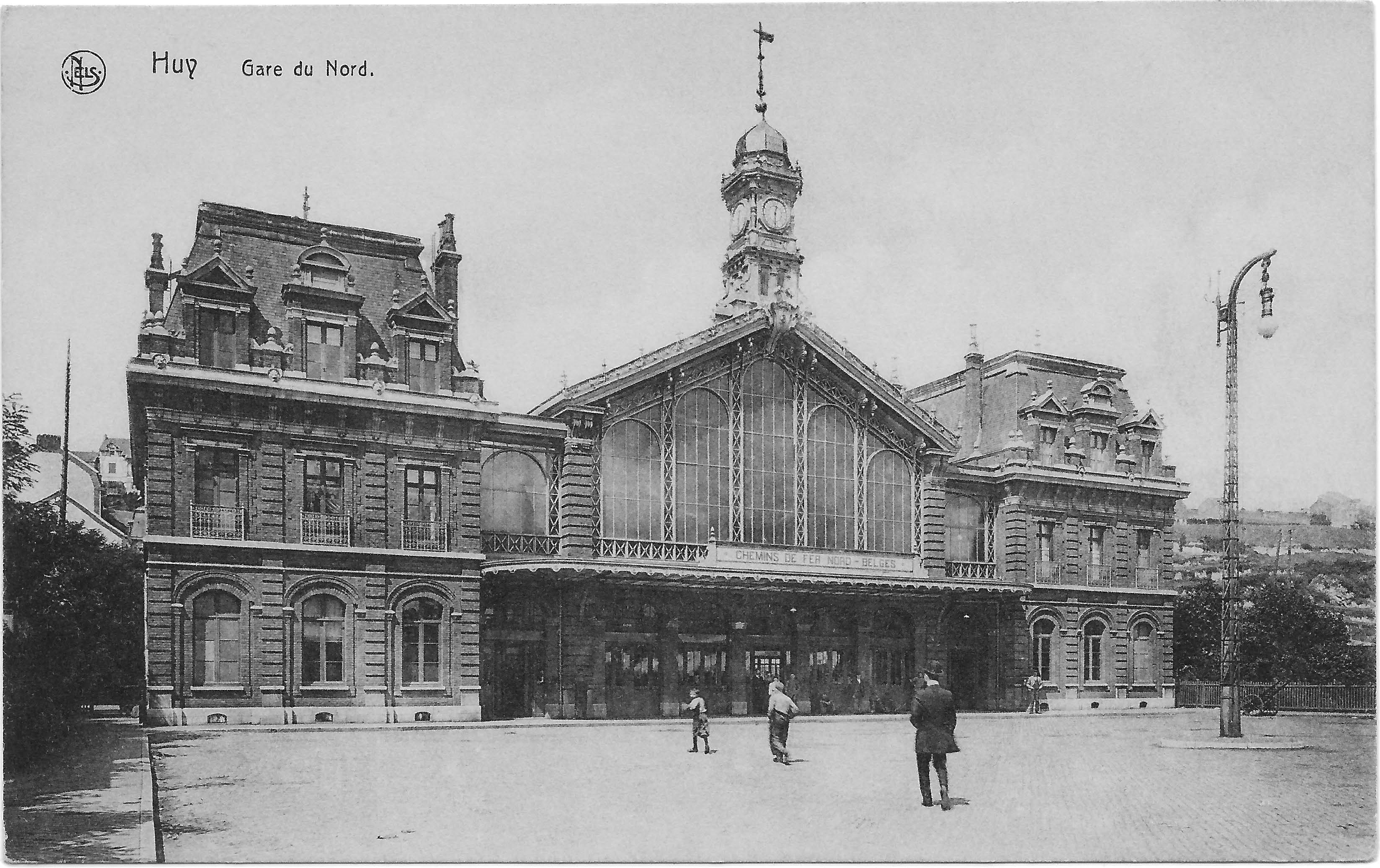 Het oude station van Hoei